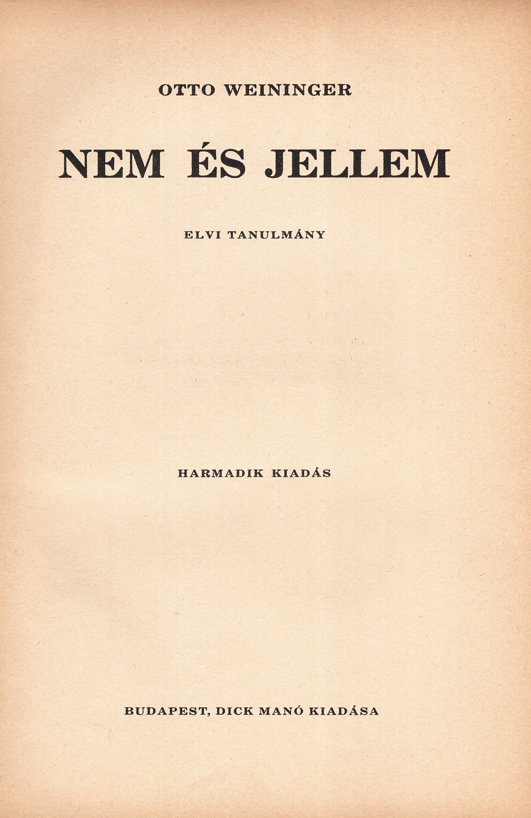 Otto Weininger: Nem és jellem